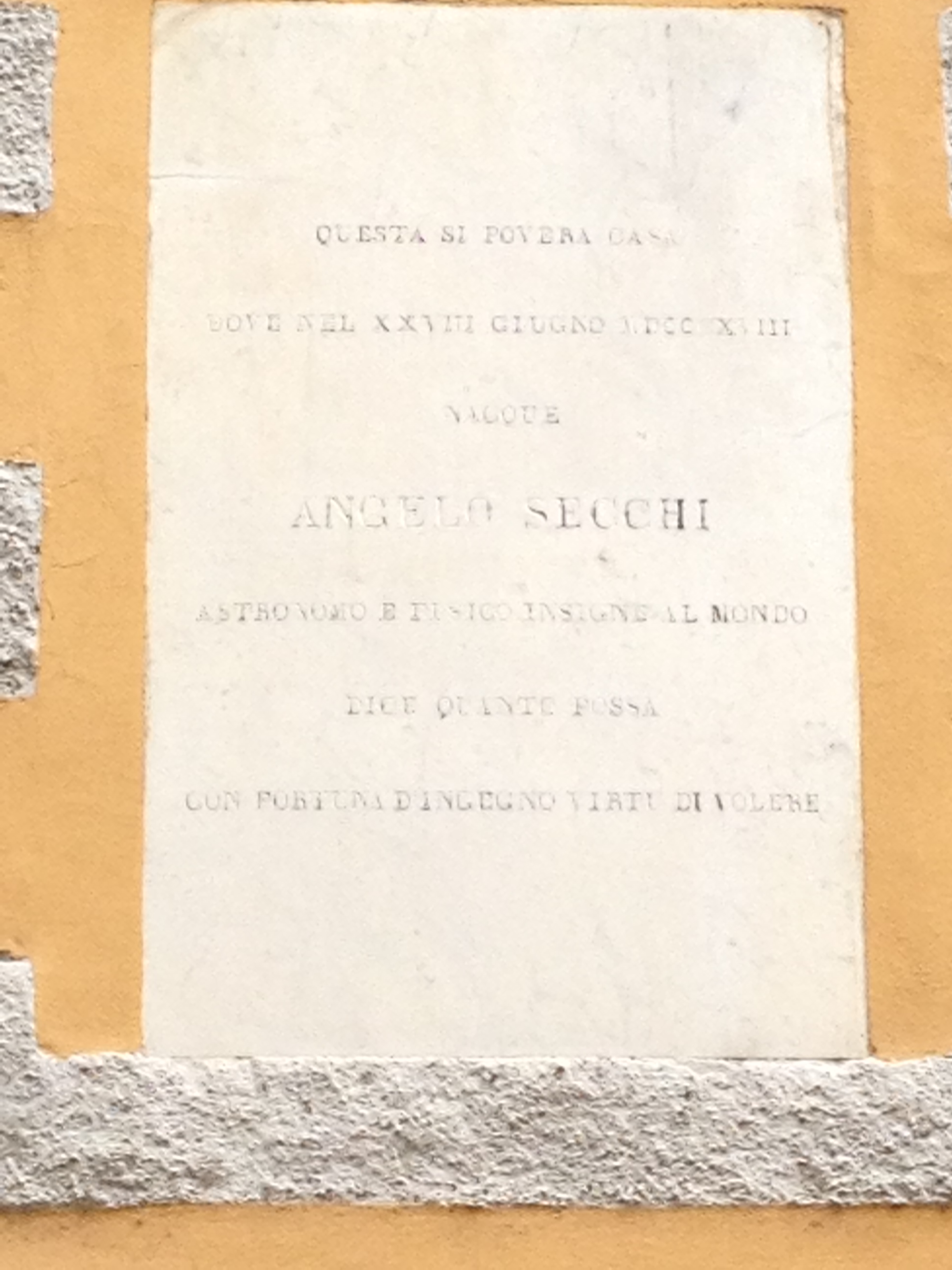 Lapide posta sulla casa natale di Angelo Secchi in via Porta Brennone a Reggio nell'Emilia.